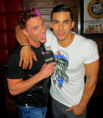 Brent Corrigan e Topher DiMaggio no Castro's Warehouse em 9-5-13.